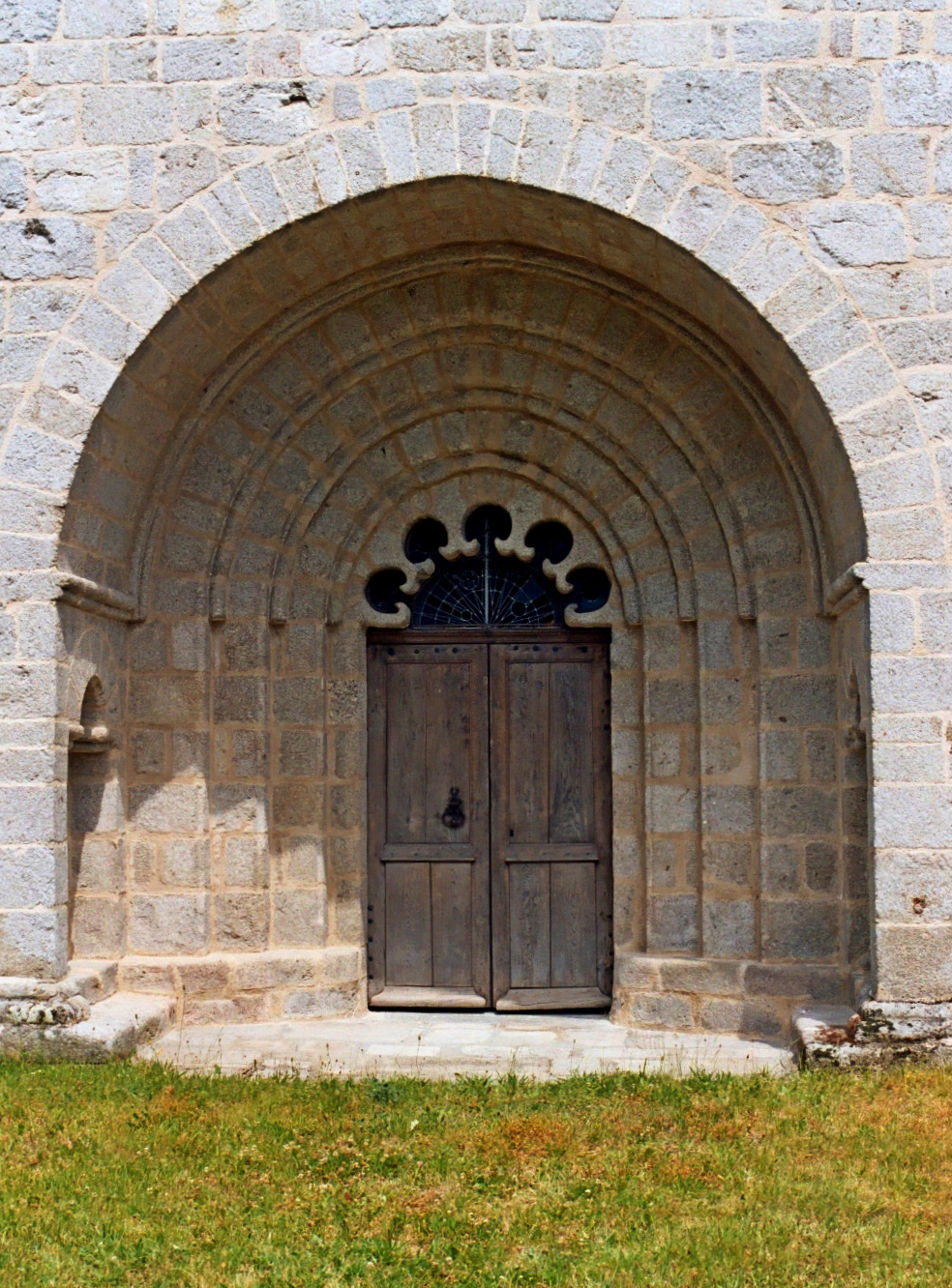 St_Bonnet (Corrèze) : portail polylobé